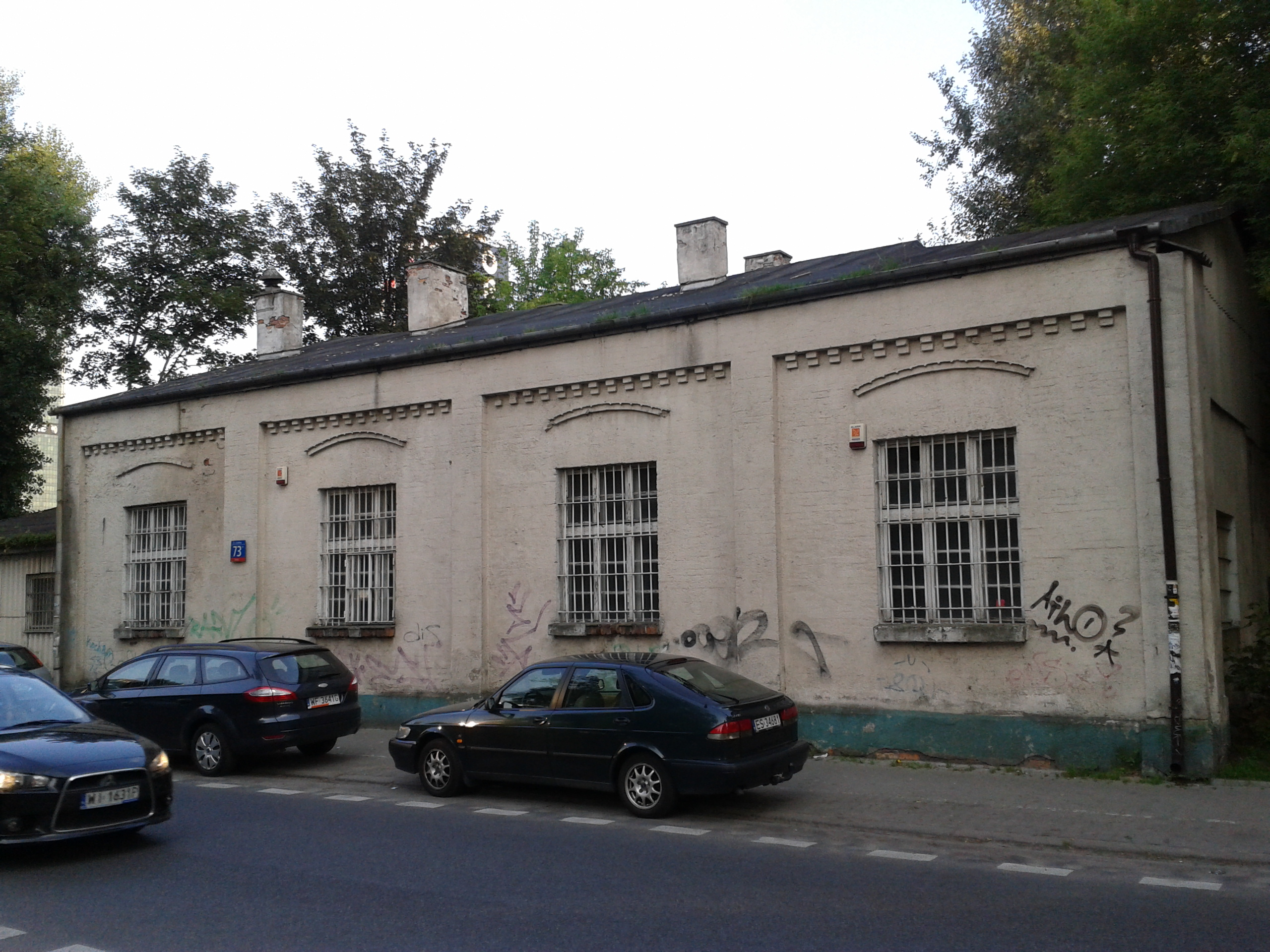 Warsztaty kolei warszawsko wiedenskiej - budynek zburzony 17 sierpnia 2013